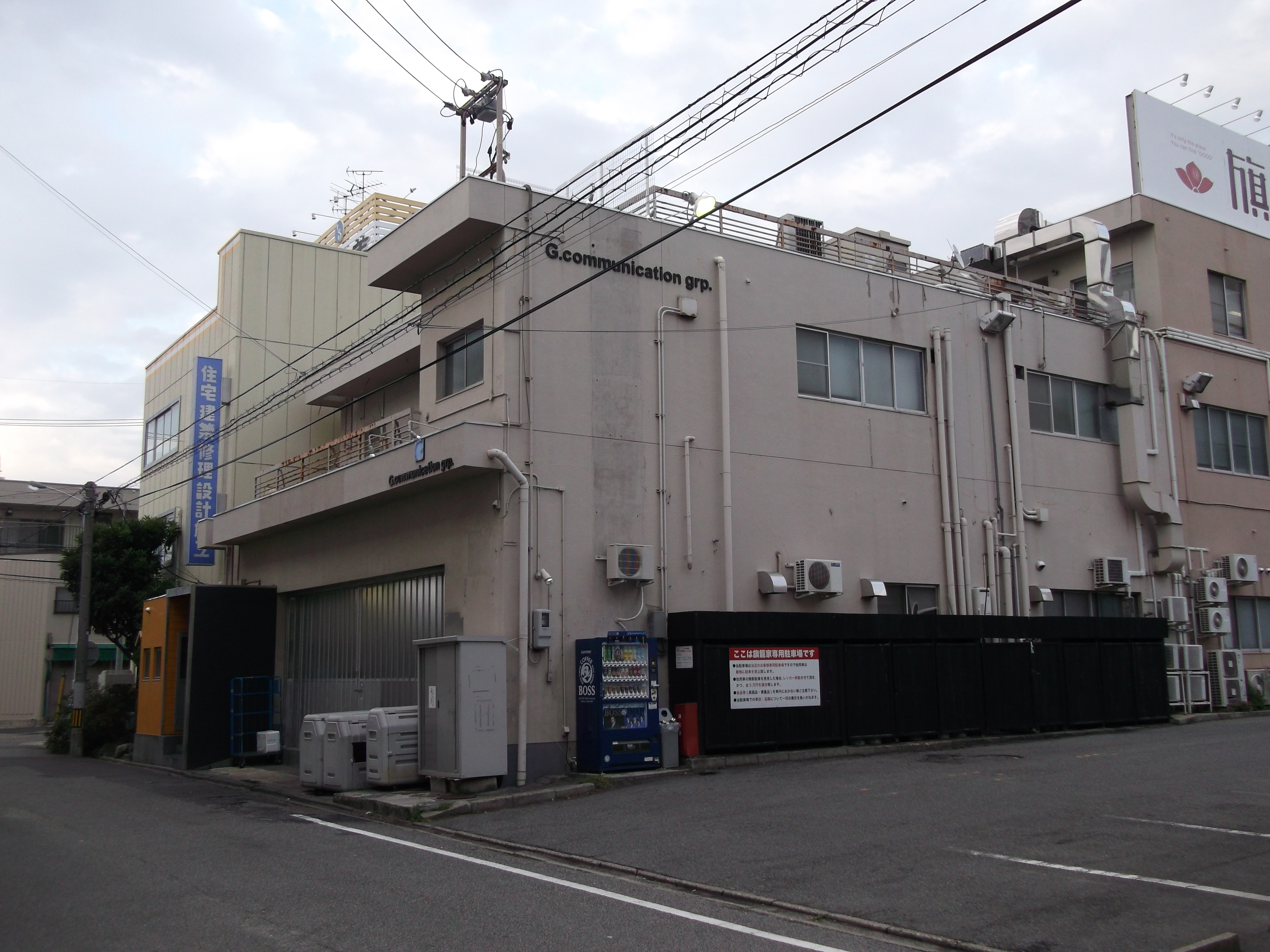 名古屋市北区萩野通のG.communication本社。旧大名寿司本社ビル。